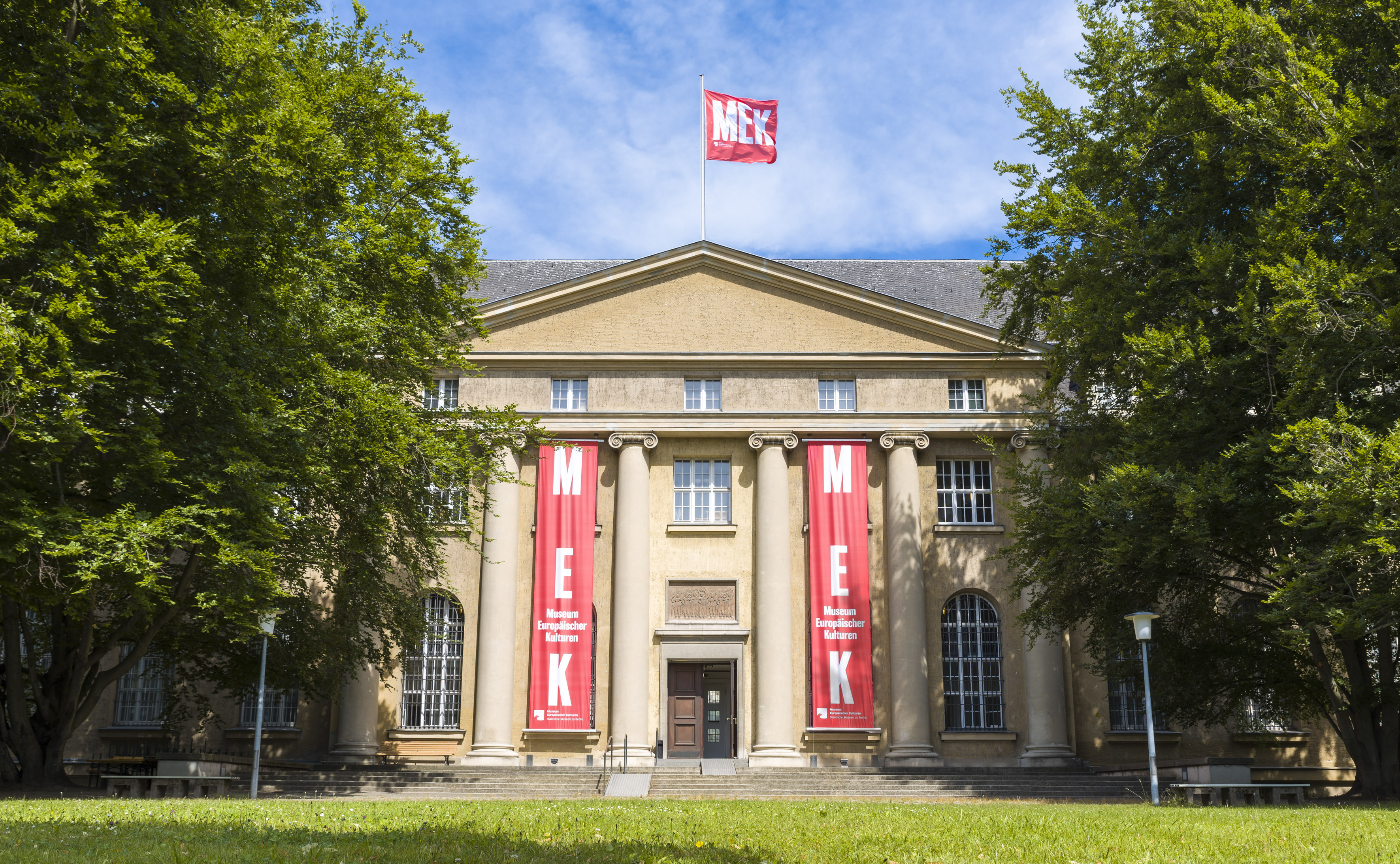 Frontansicht des Museum Europäischer Kulturen im Juni 2018.